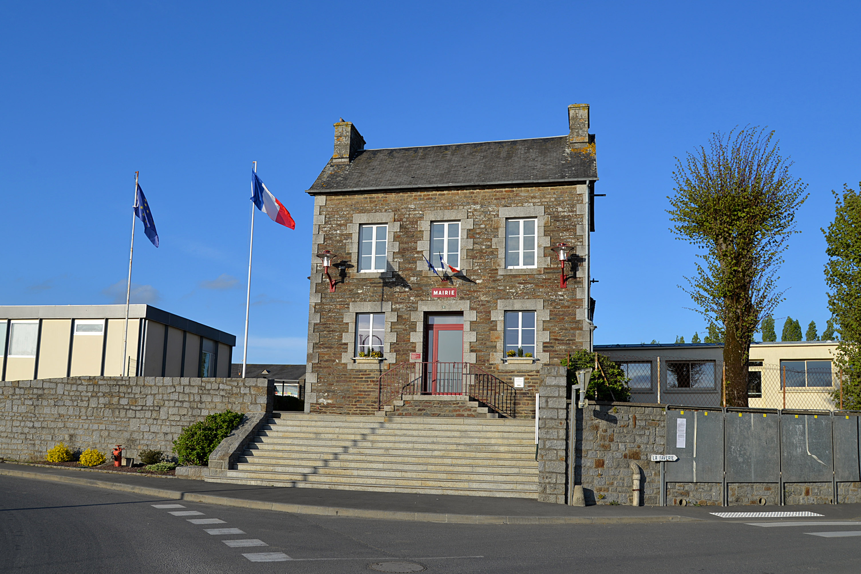 Virey (Manche)